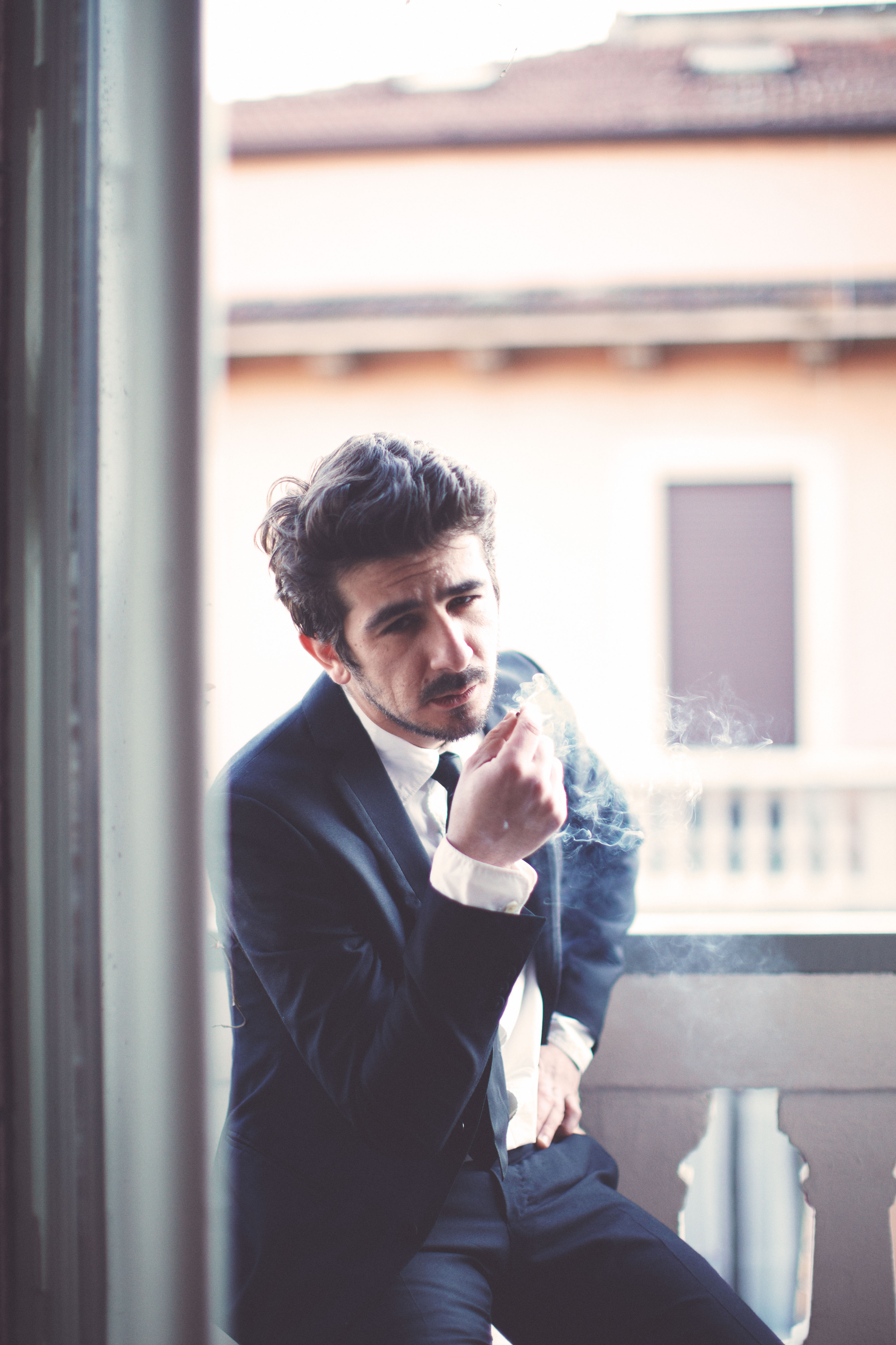 Francesco Mandelli